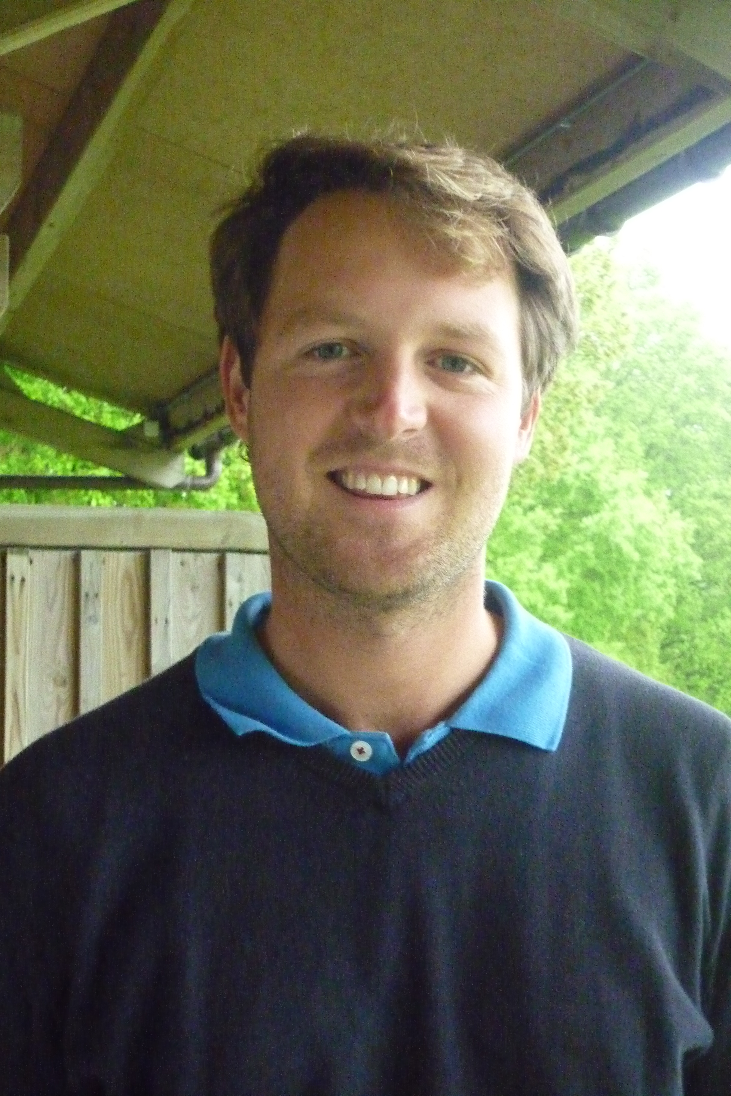 Guillaume Watremez, Telenet Trophy